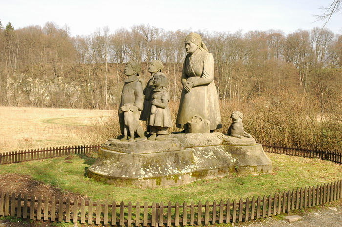 Sousoší Babičky v Ratibořicích, dílo Otty Gutfreunda